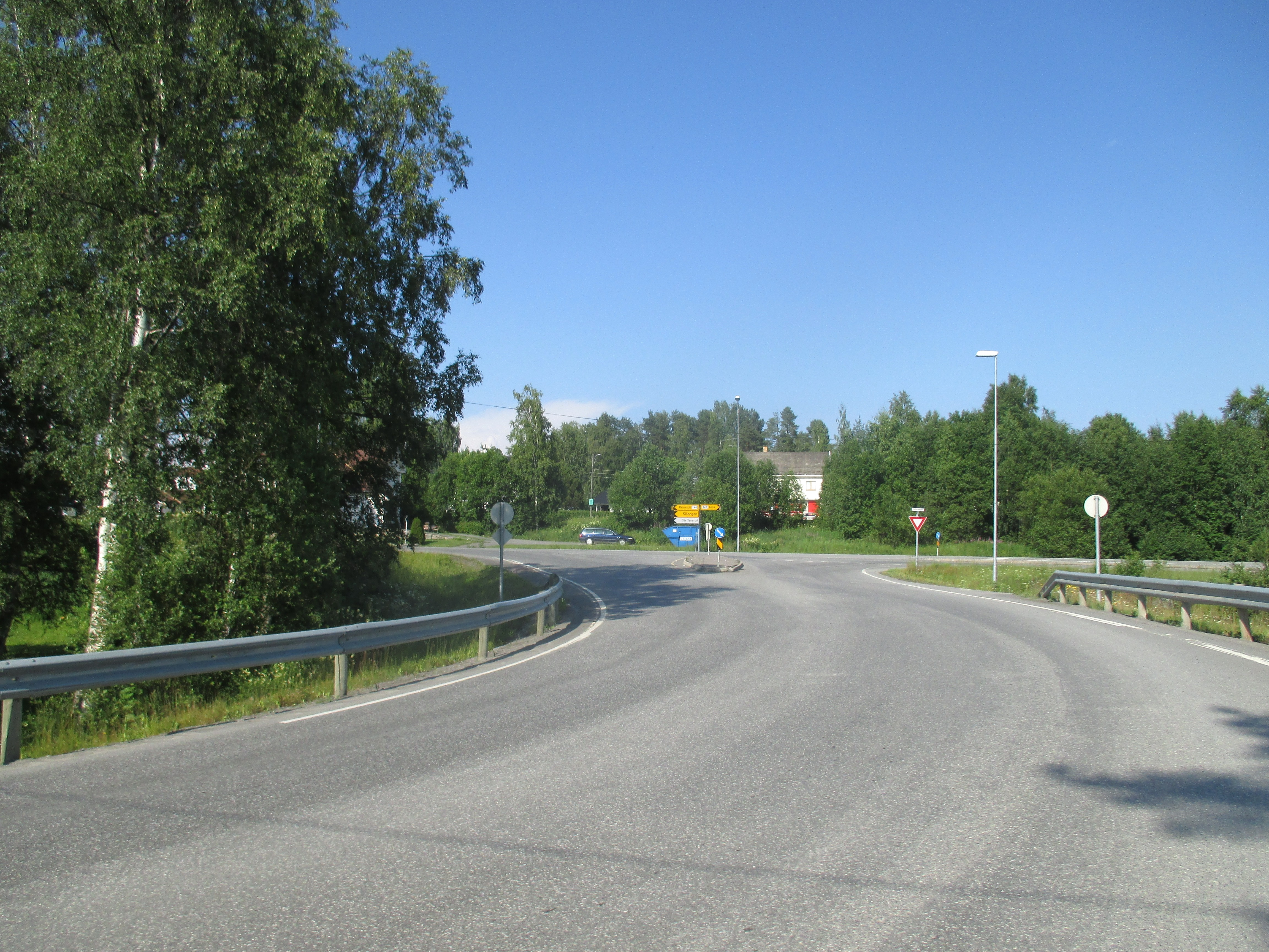 Fylkesvei 2370 (tidl. 111) like sør for primær fylkesvei 246 utenfor Bøverbru